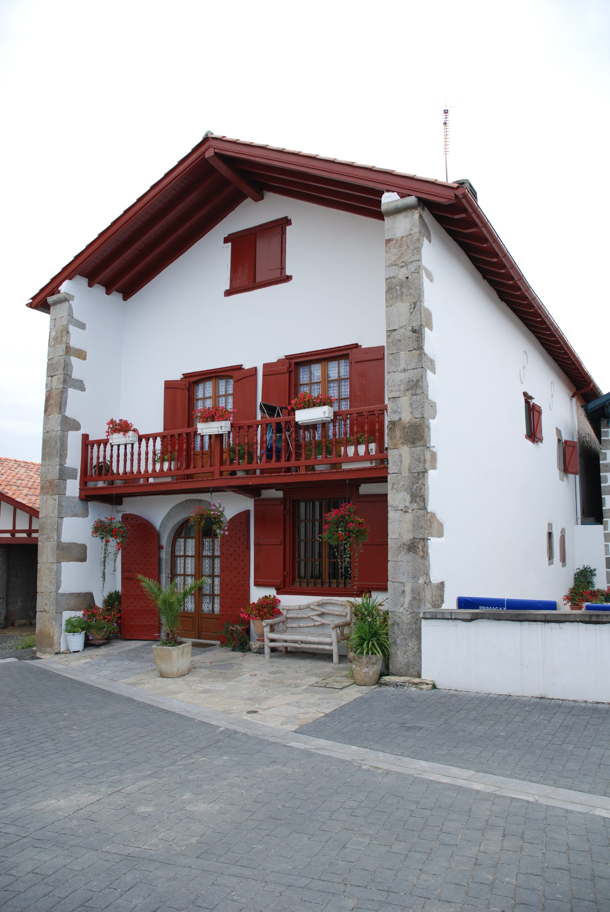 Armendarits, maison de Basse-Navarre